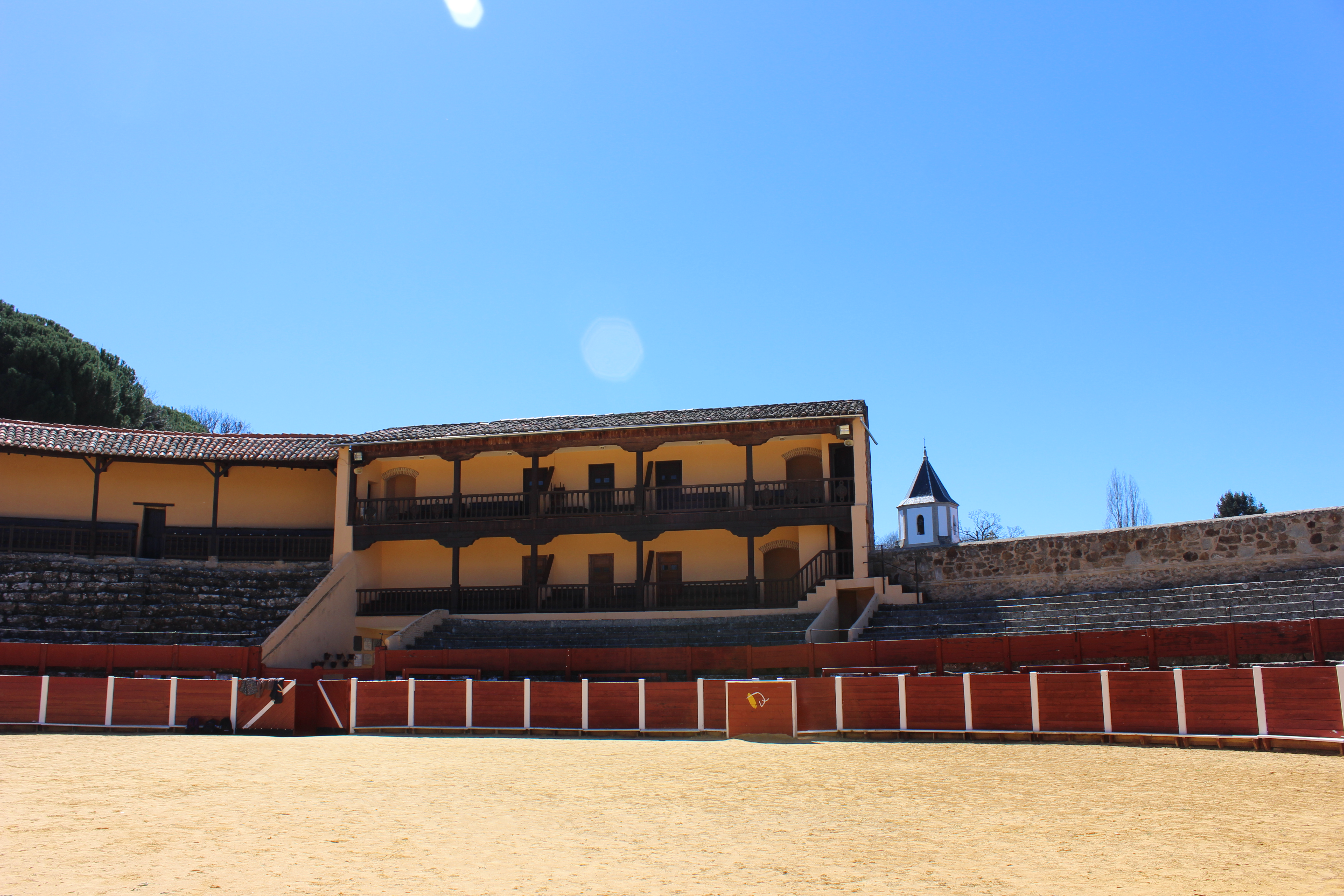 حلبة مصارعة الثيران في بيخار في مقاطعة سلامنكا الإسبانية.